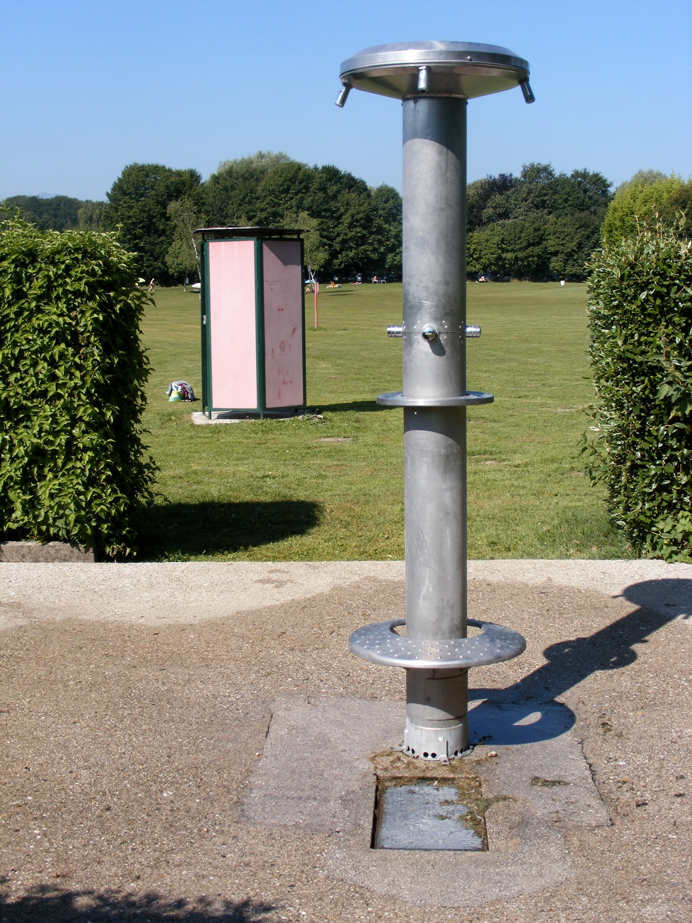 Dusche am Badesee Liefering, Stadt Salzburg.